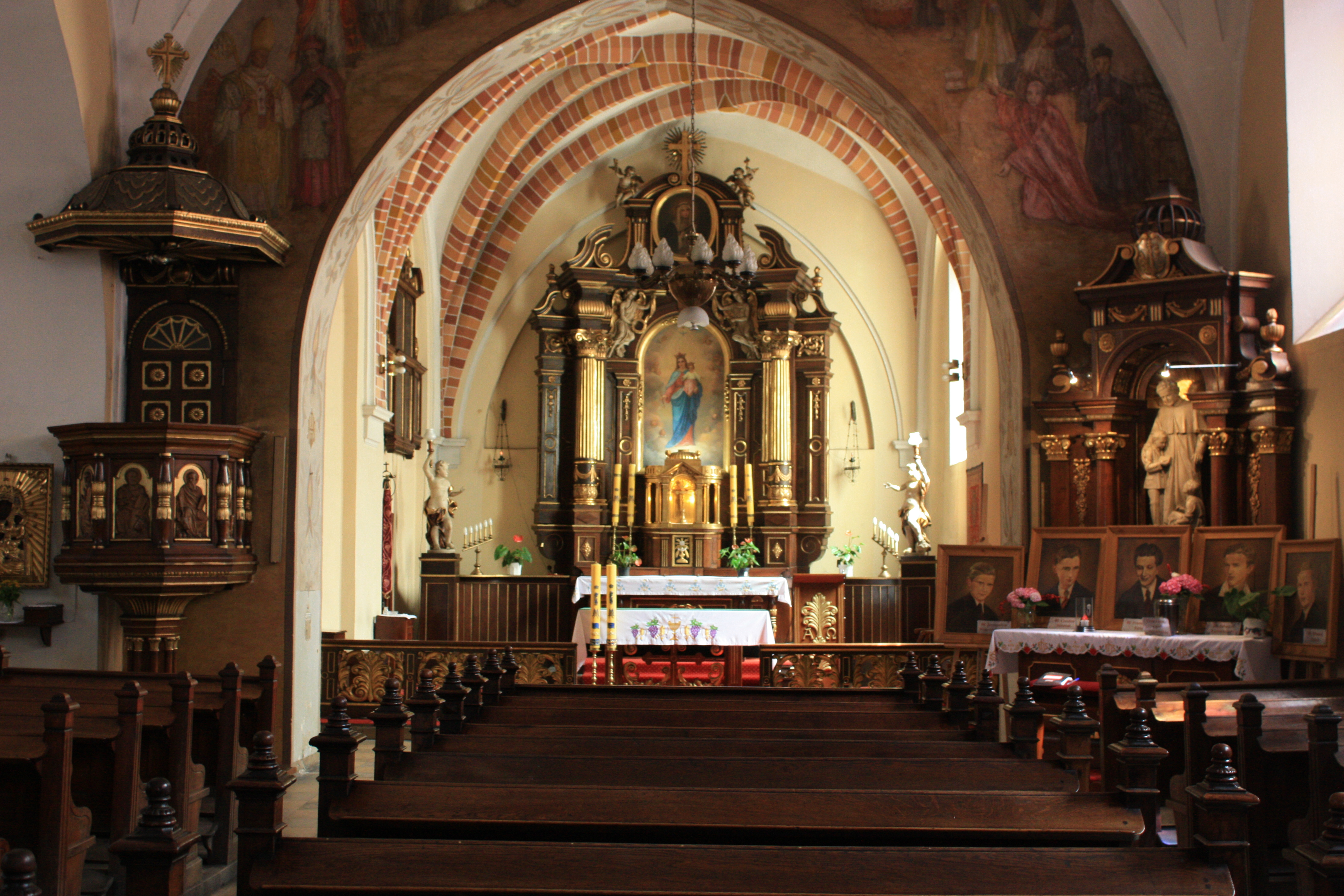 Kościół Najświętszej Marii Panny Wspomożycielki Wiernych w Poznaniu. Widok na nawę główną.